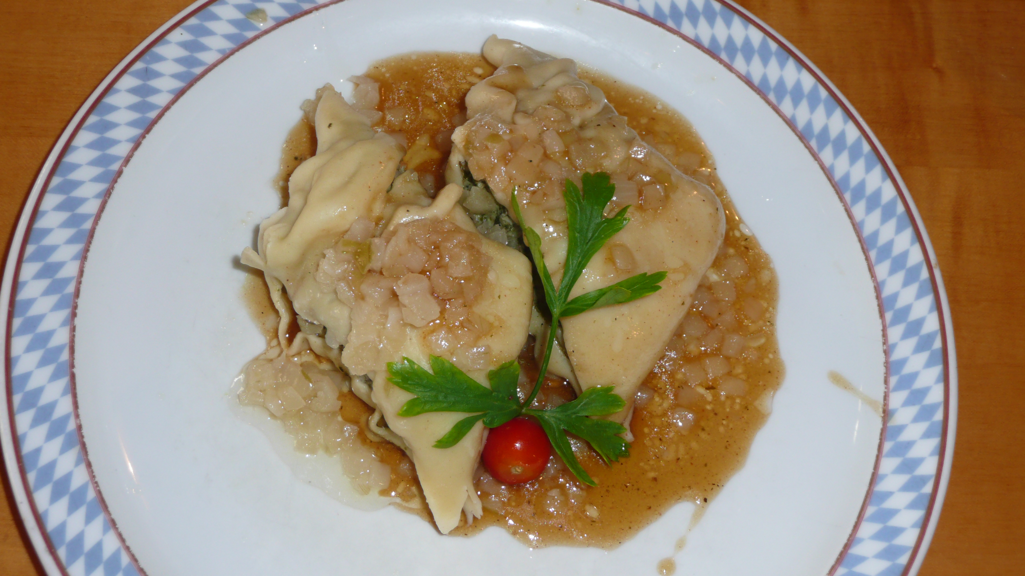 Schwäbische Maultaschen, Restaurant in Stuttgart